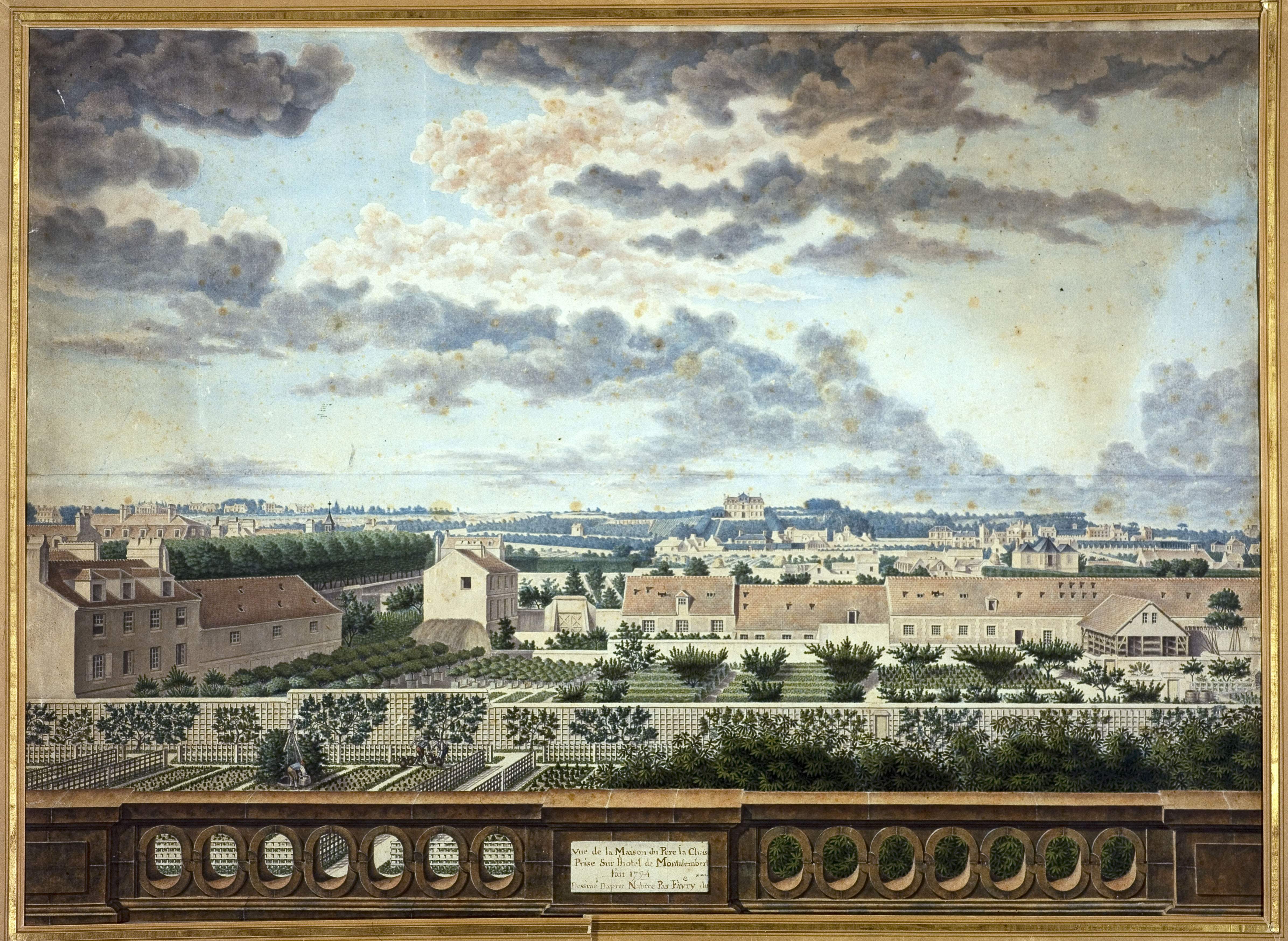 Maison du père La Chaise vue de l'hôtel de Montalembert, entre rue Basfroi et la prison de la Roquette, actuel partie Est du cimetière du Père Lachaise, 11ème arrondissement Auteur(s) : Du Favry, dessinateur Dates : 1794 Aquarelle Musée Carnavalet, Histoire de Paris Numéro d’inventaire : D.7049